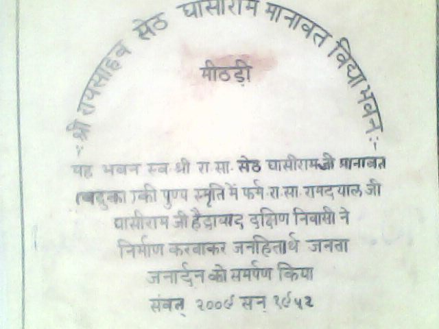 शिलालेख- (1951)- राजकीय सीनियर सैकंडरी विध्यालय